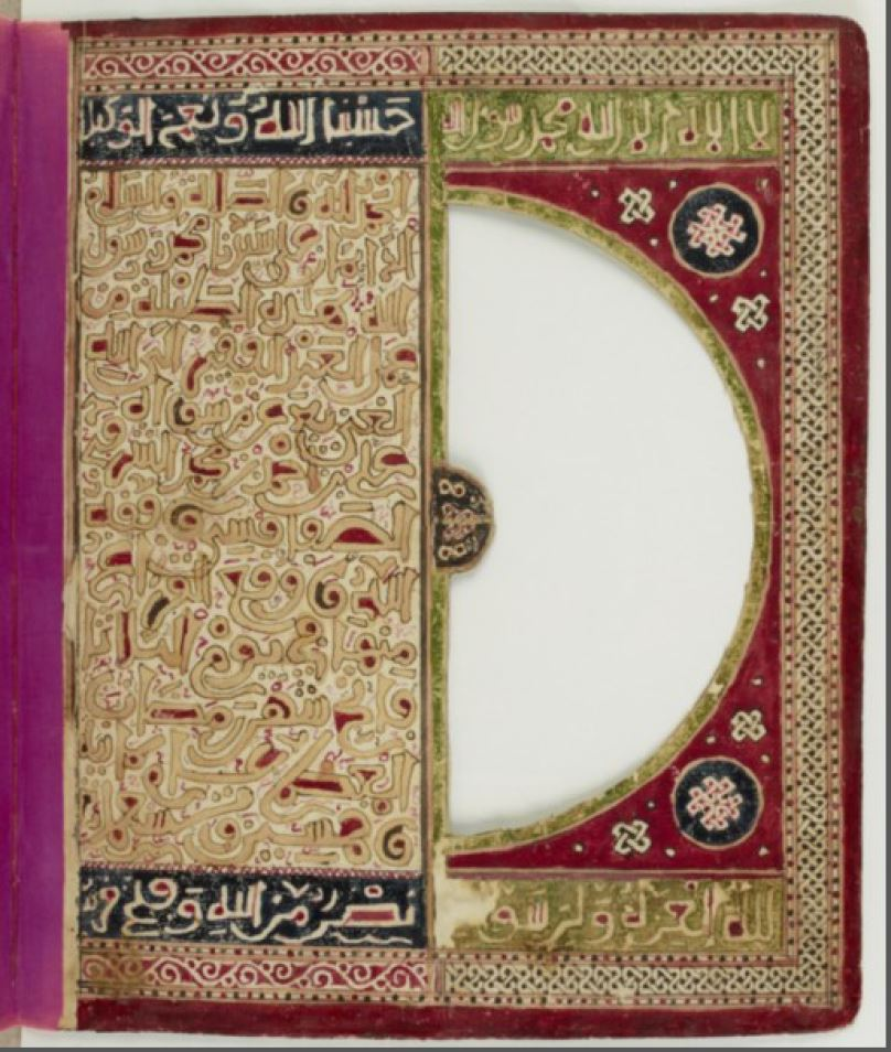 كتاب في الجغرافيا فيه عدة خرائط للموانئ البحرية في البحر المتوسط